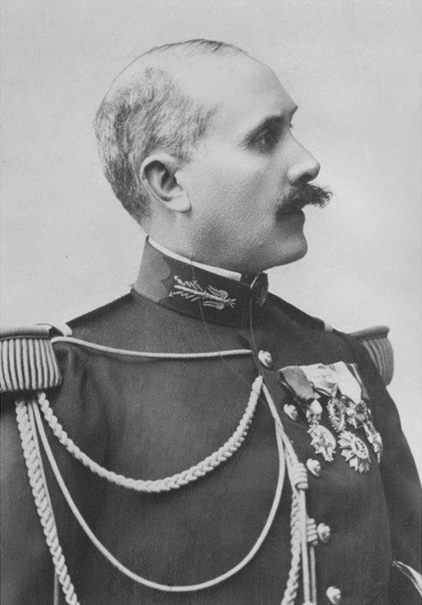 Le colonel du Paty de Clam